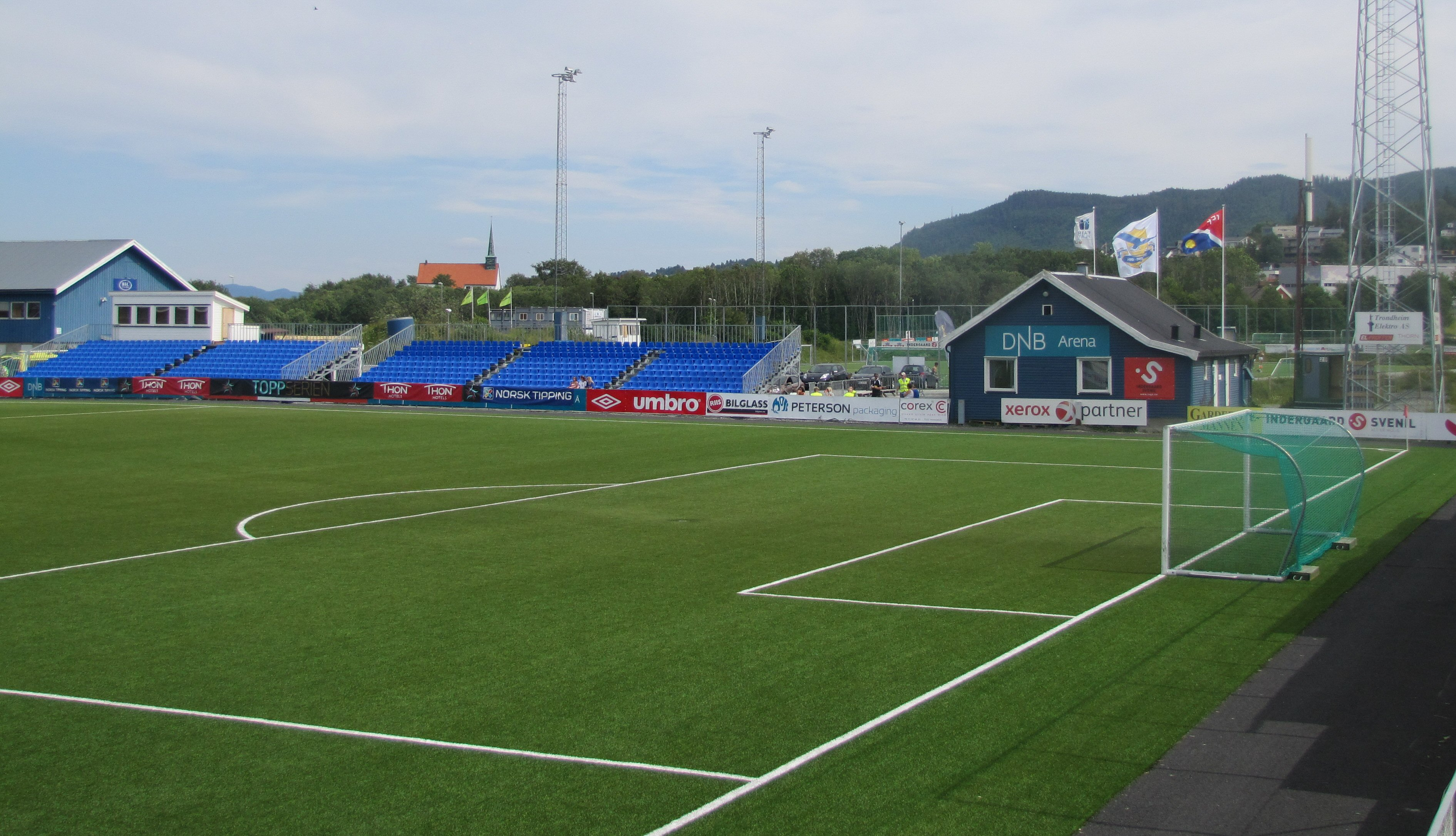 DNB Arena, Ranheim